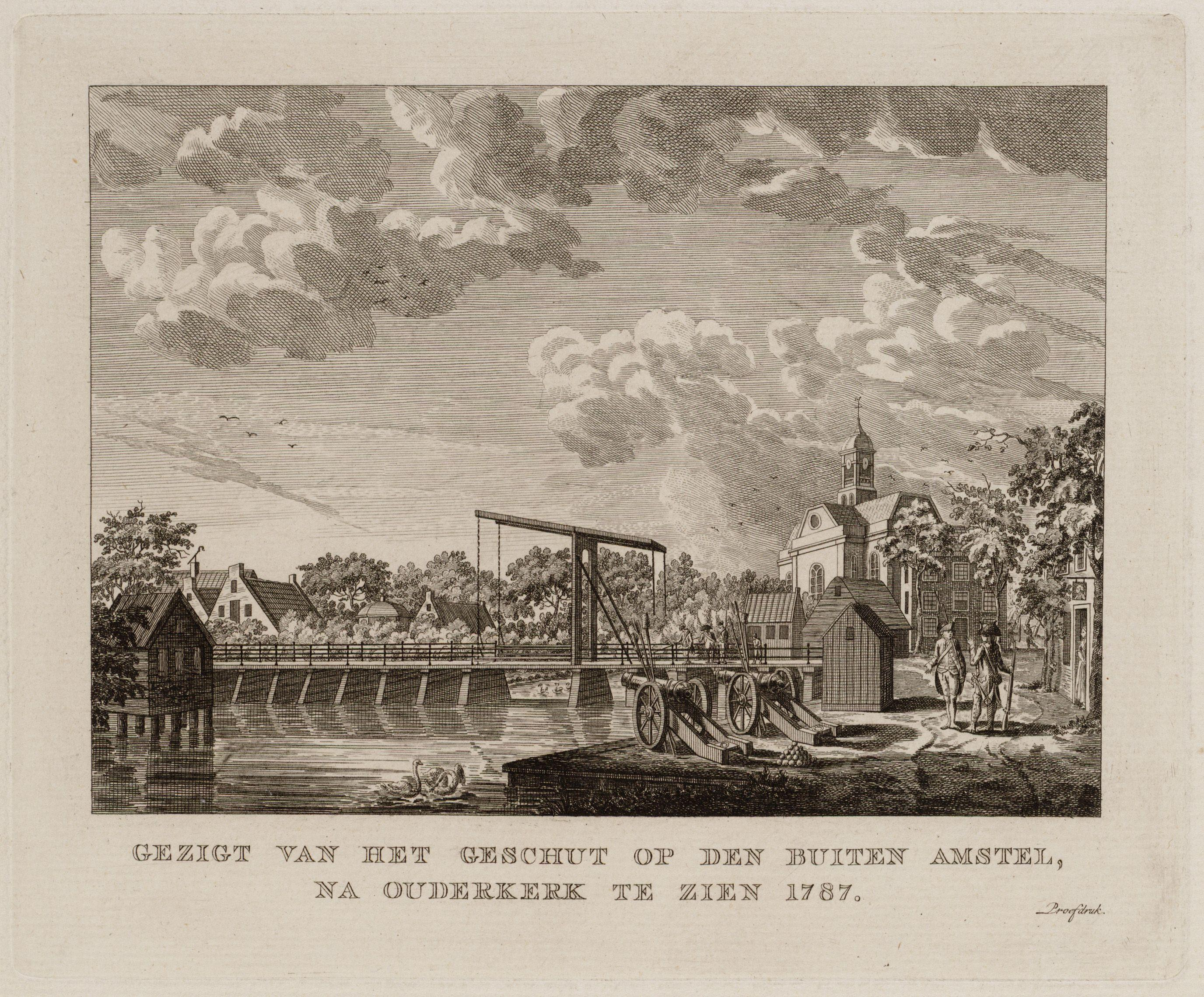 Afbeeldingen der batterijen om Amsterdam. Gezigt van het geschut op den Buiten Amstel, na Ouderkerk te zien 1787 Afbeeldingen van de tijdelijke verdedigingswerken om Amsterdam, aangelegd vanwege het beleg door Pruissische troepen in september 1787. Serie van veertien anonieme etsen. De batterij op de Amsteldijk-Noord bij Ouderkerk aan de Amstel. Afmetingen 140 x 195 mm